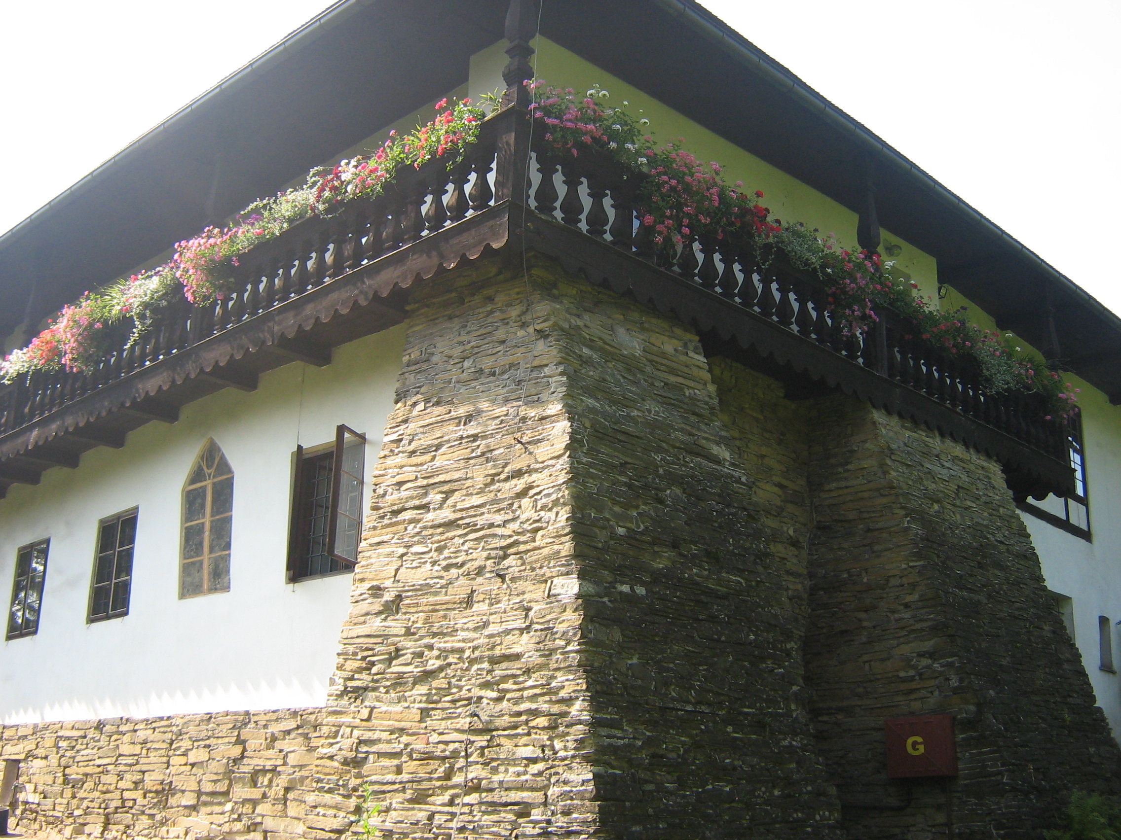 Dwór w Stryszowie od strony ogrodu